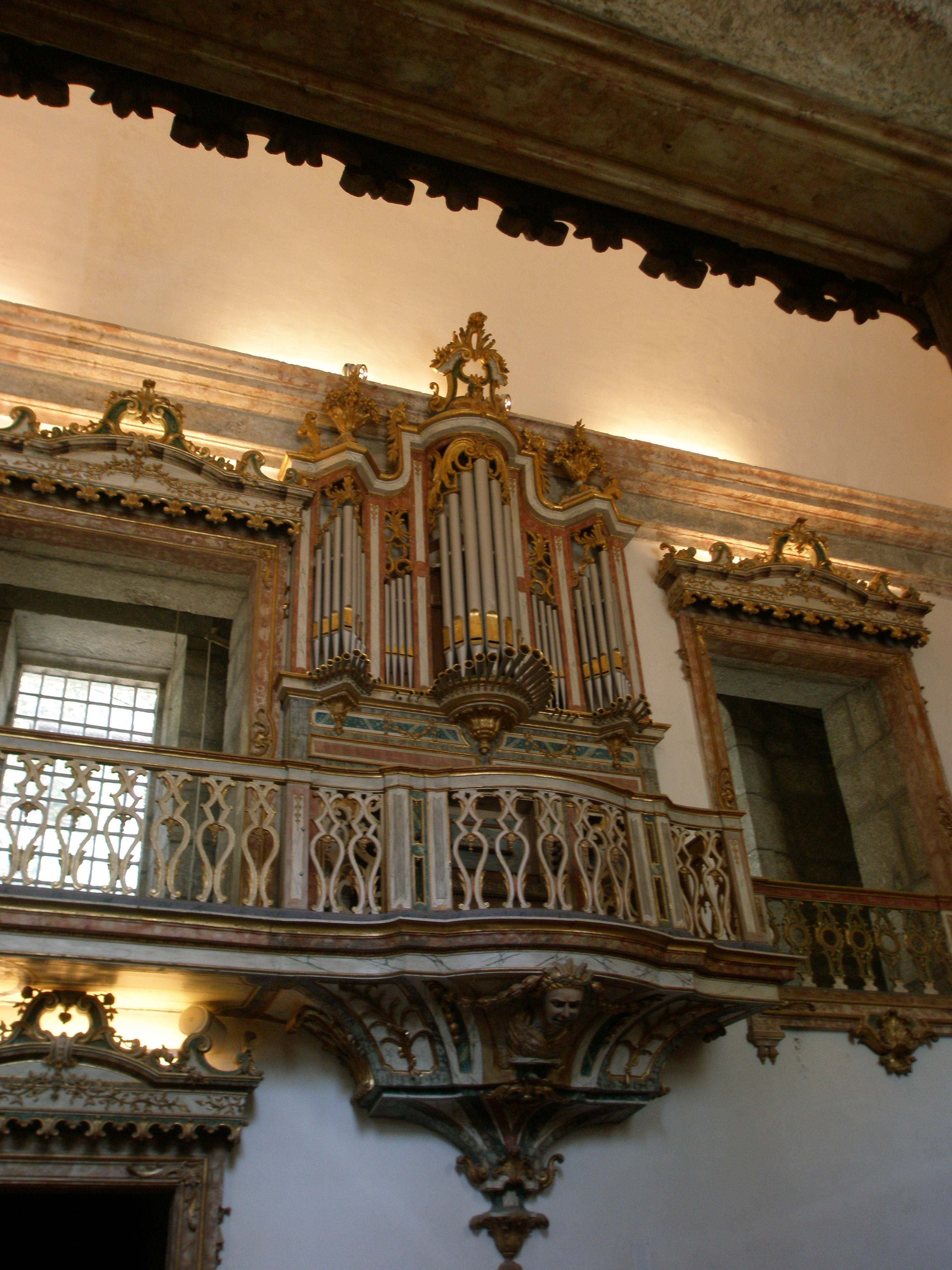 Orgão do Santuário de Nossa Senhora da Abadia